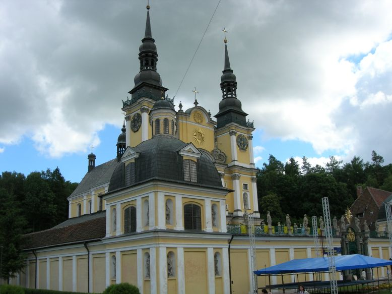 Święta Lipka - Bazylika Nawiedzenia Najświętszej Maryi Panny z wyposażeniem wnętrza, krużgankami i klasztorem